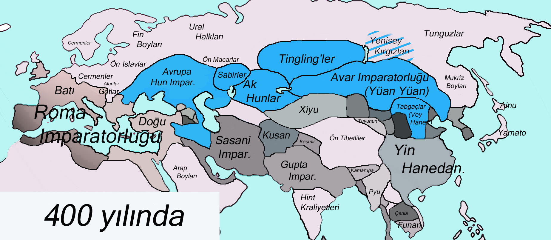 Kaynak: Haritanın büyük bir kısmı Thomas Lessmann'nin izini ile kendi ürettiği Tarihi dünya haritaları'ndan alınmıştır. Ayrıca Jean-Paul Roux'un Türklerin Tarihi (ISBN 975-997-091-0) adlı kitabındaki tariflerine göre ve Büyük Tarih Atlası (Arkın Kitabevi ISBN 975-402-012-4) ile bazı düzeltmeler ve ilaveler yapılmıştır.